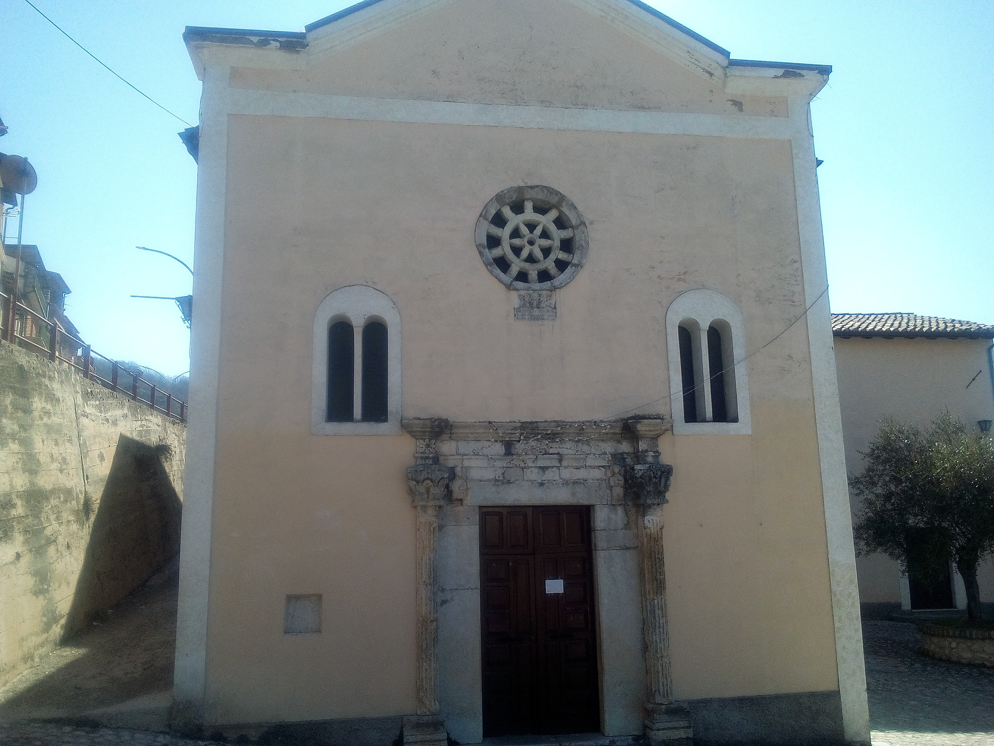 Facciata della chiesa di Sant'Anastasia di Borgorose